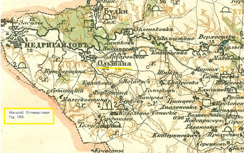 Карта _1906 год